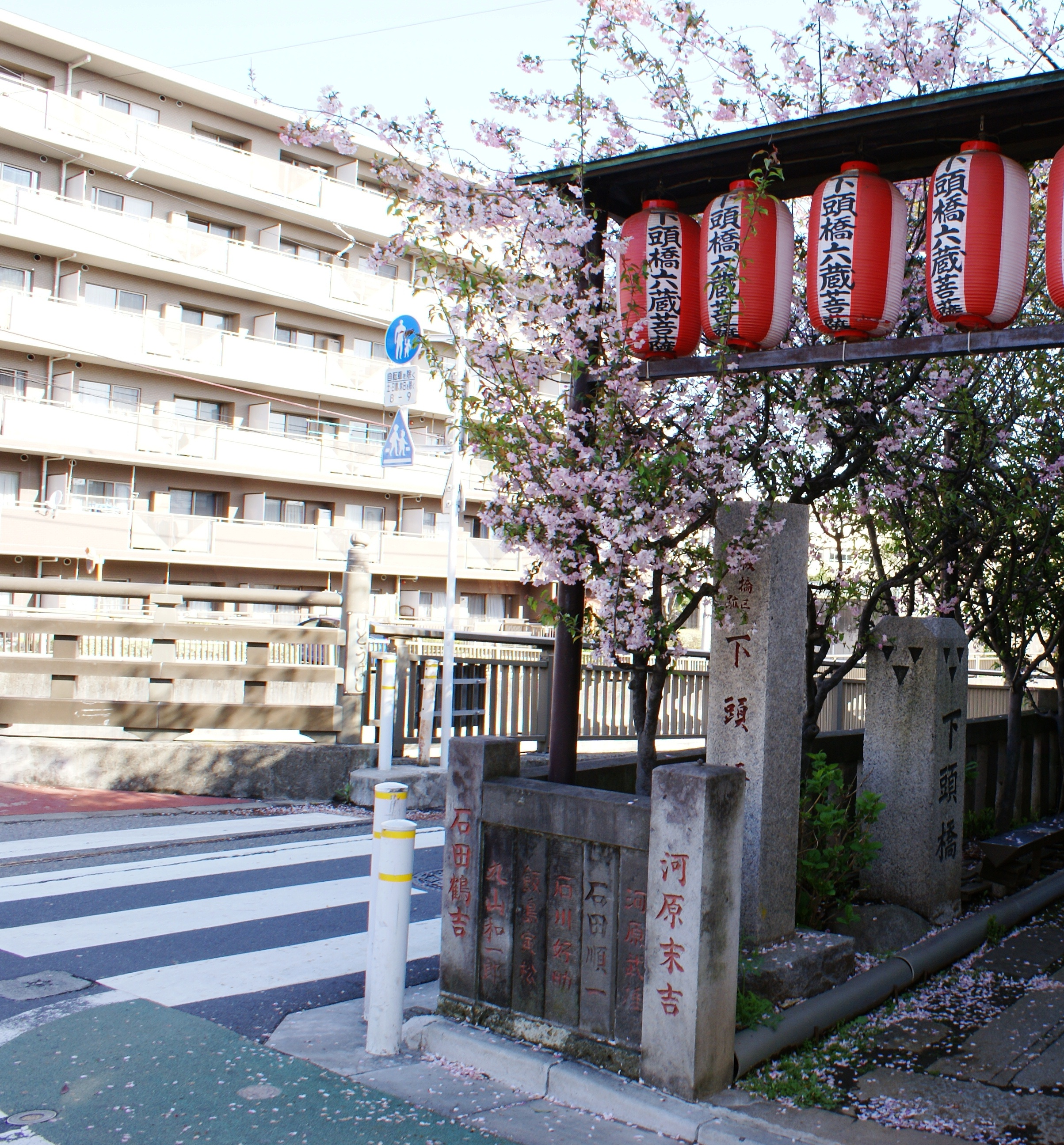 旧川越街道下頭橋